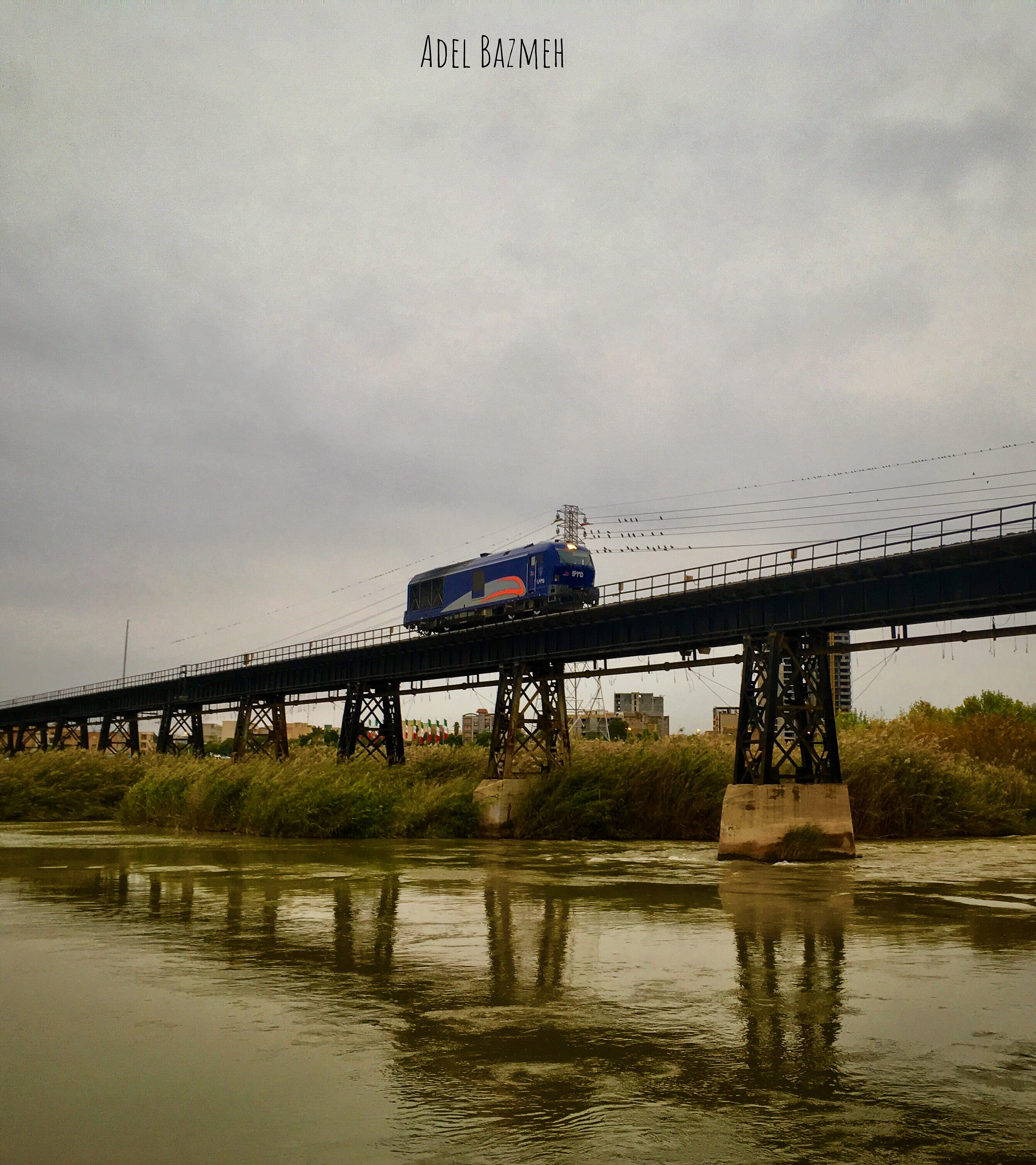 پل سیاه/ پل فلزی راه آهن